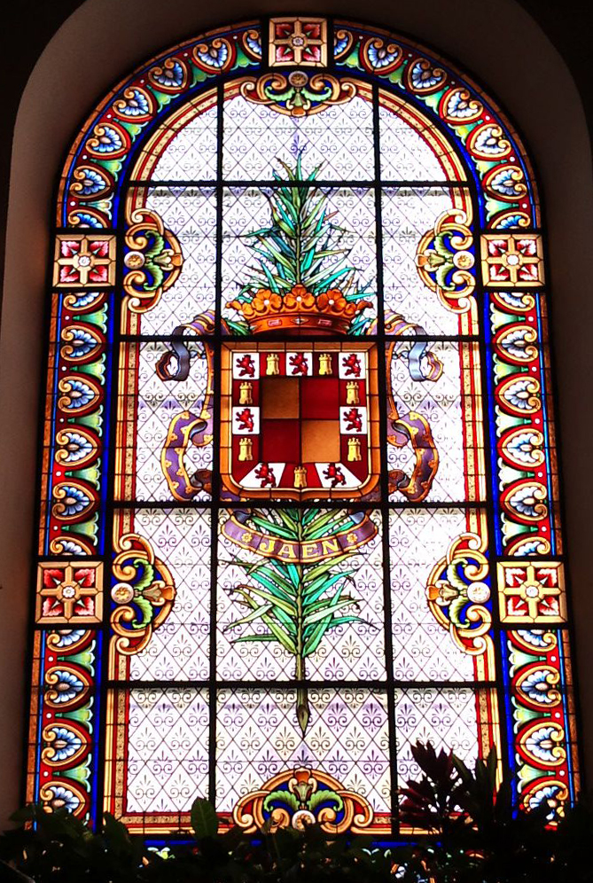 Antigua versión del escudo de la ciudad de Jaén en la vidriera de la escalera principal del Palacio Municipal, sede del Ayuntamiento.